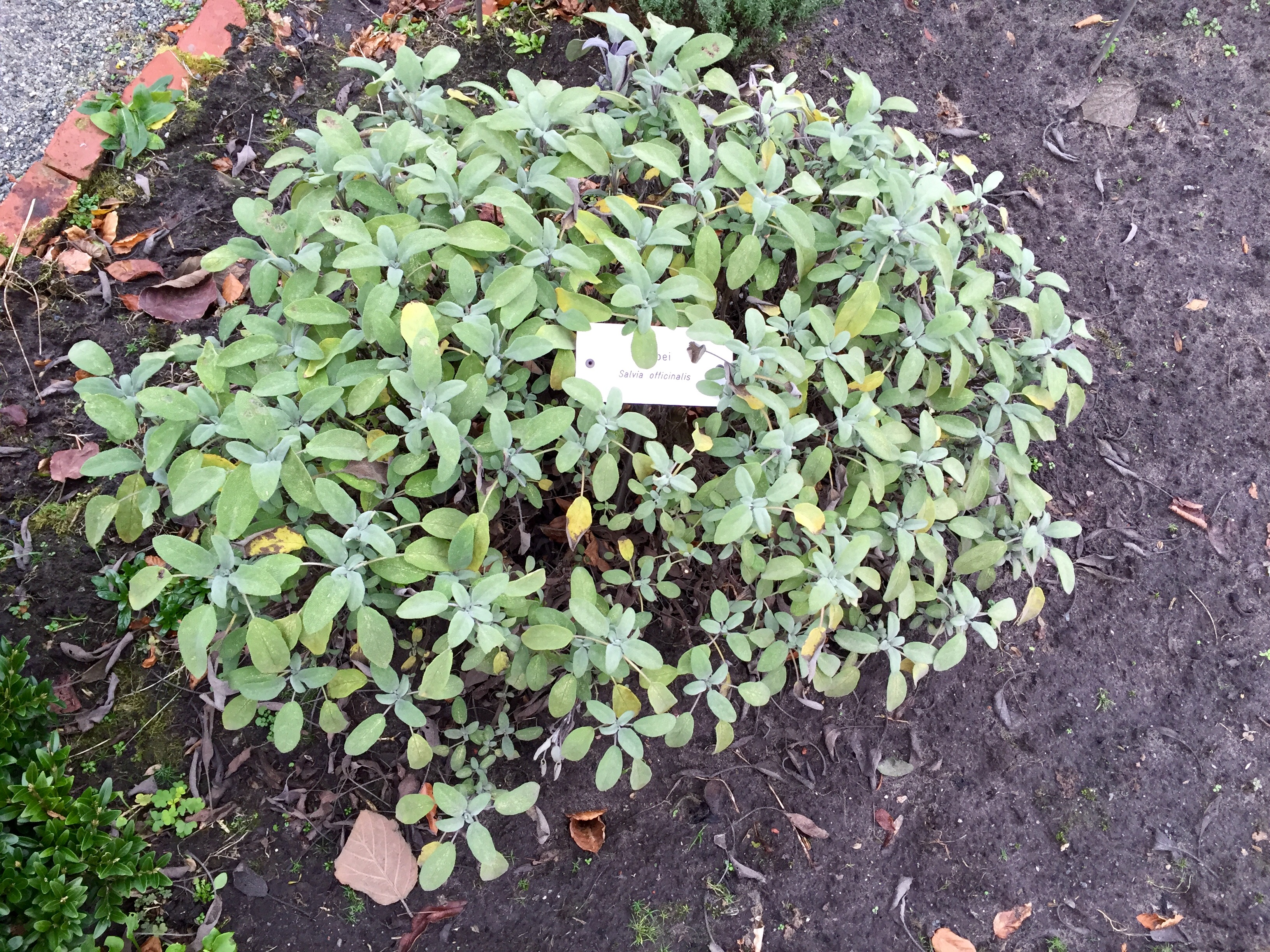 Salbei im Kräutergarten von Kloster Ihlow